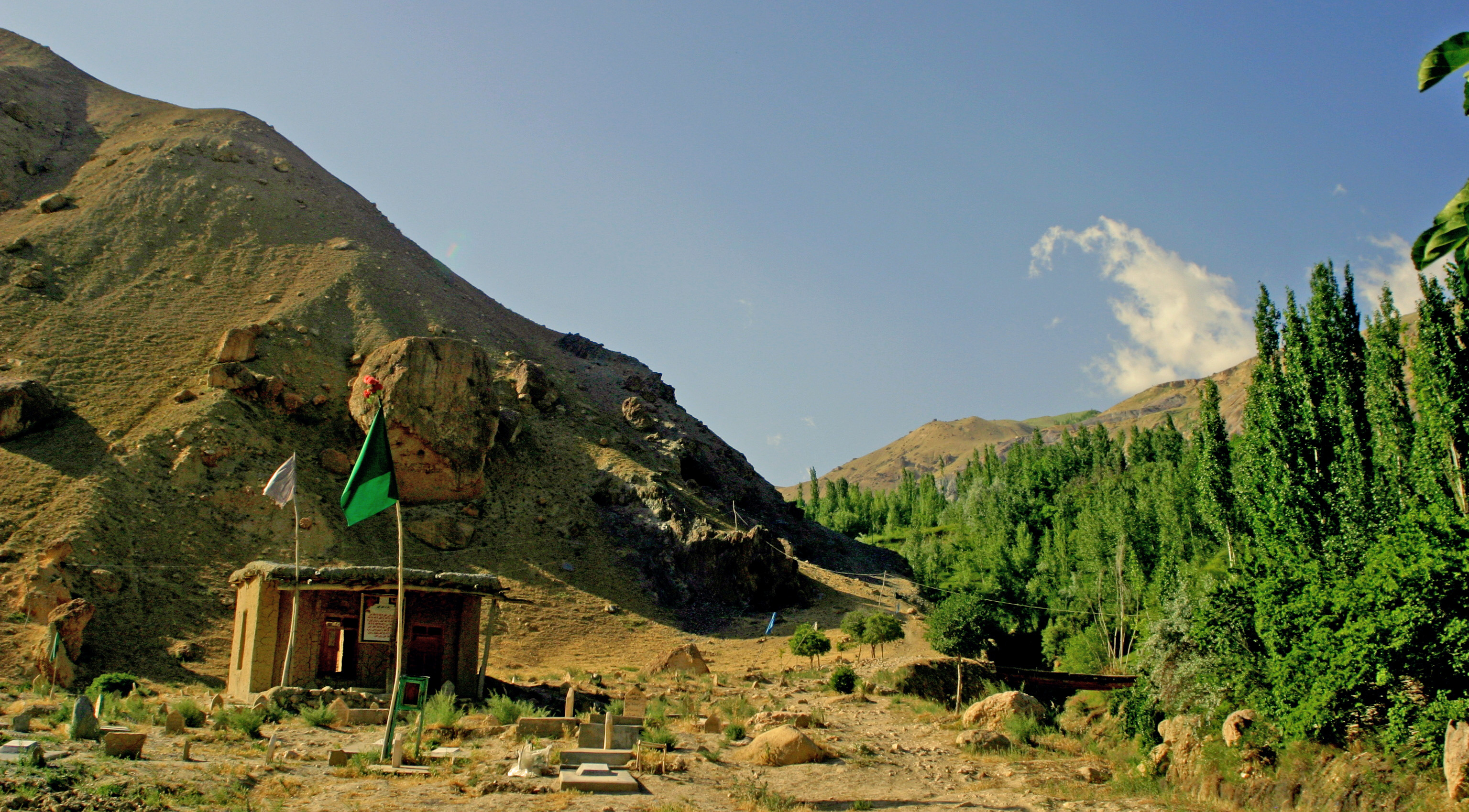 این عکس از قبرستان سرچشمه واقع در ترخوج ولسوالی بلخاب است.